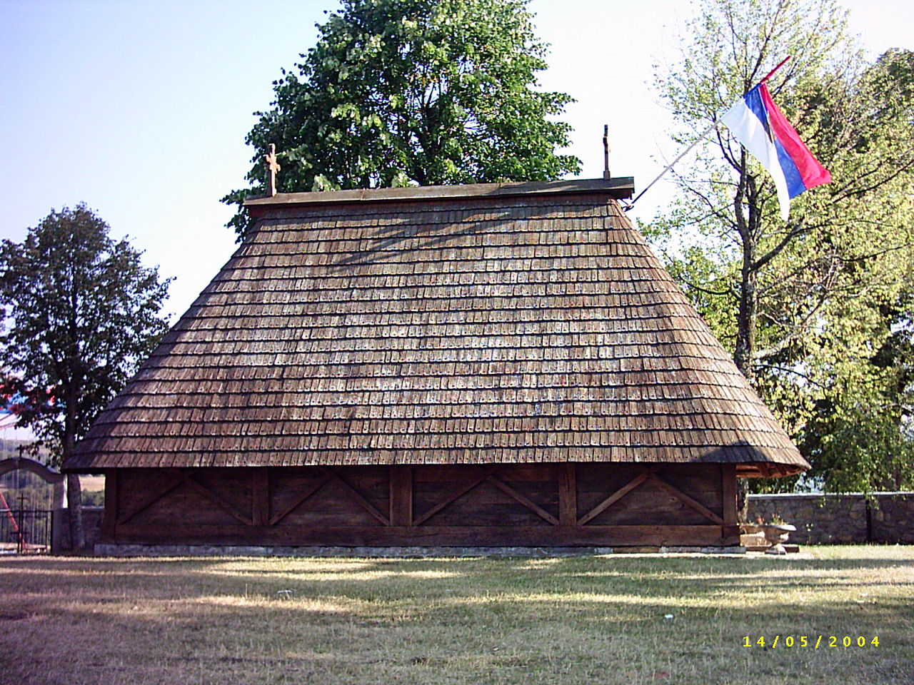 Црква брвнара у Јаворанима